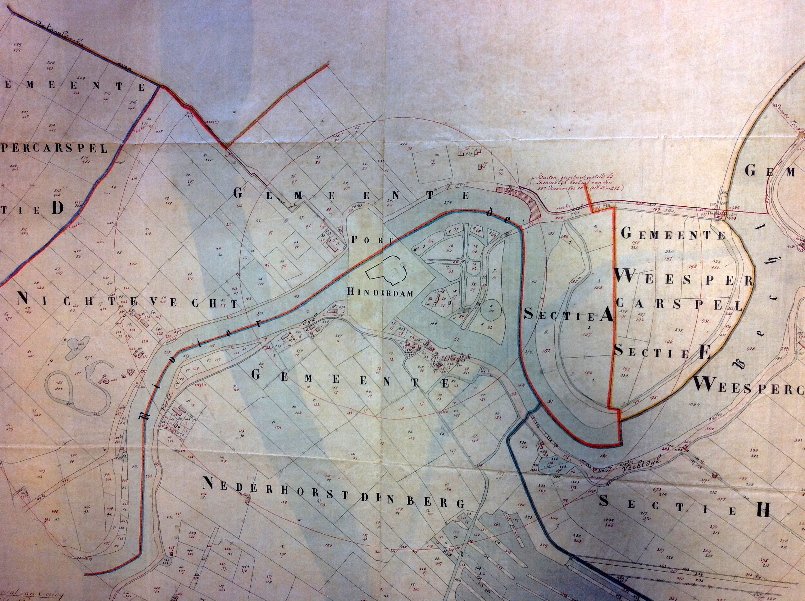 Fragment van de tekening met de verboden kringen bij het Fort Hinderdam. Origineel gezien in Het Utrechts Archief. Titel op blad: Plan betrekkelijk de verboden kringen van het Fort Hinderdam Opgemaakt ter voldoening aan Artikel 20 der Wet van 21 december 1853 (Staatsblad nr 128.) Naar aanleiding van het Koninklijk Besluit van 30 November 1875 (Staatsblad nr 212.) Ondertekend met: Naarden 8 augustus 1893 De kapitein Eerstaanwezend ingenieur Handtekening onleesbaar